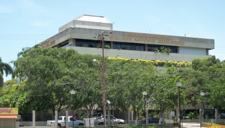 Sede de Gobierno del estado, ubicado en Barcelona